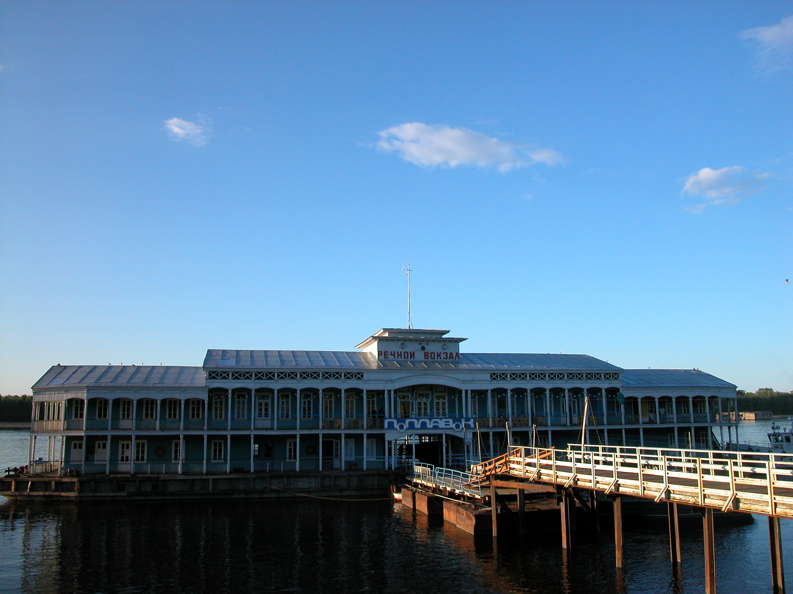 Дебаркадер Рыбинского речного пассажирского порта Дебаркадер Рыбинского речного пассажирского порта